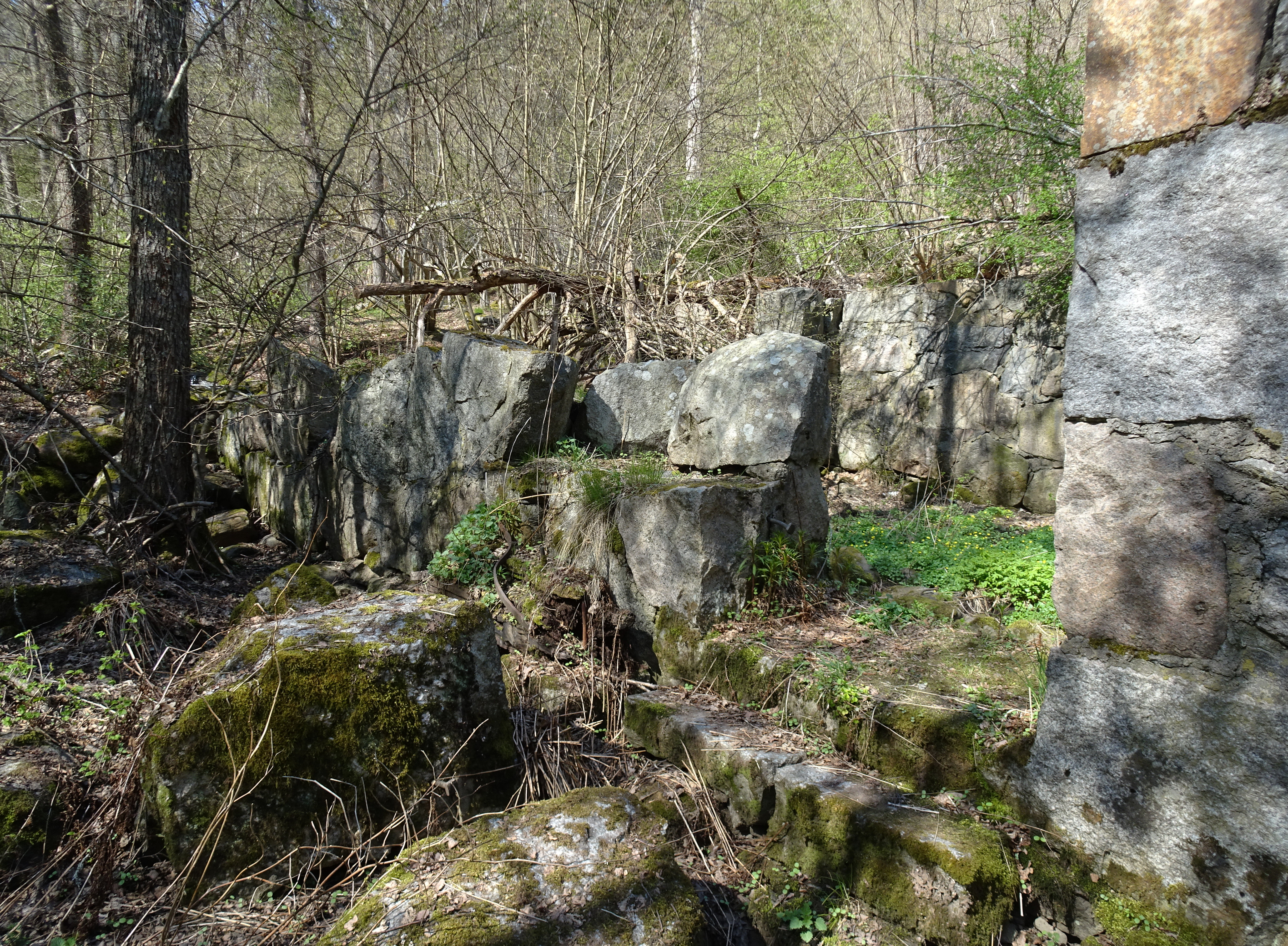 Gladö kvarns kvarnbyggnad (ruin)